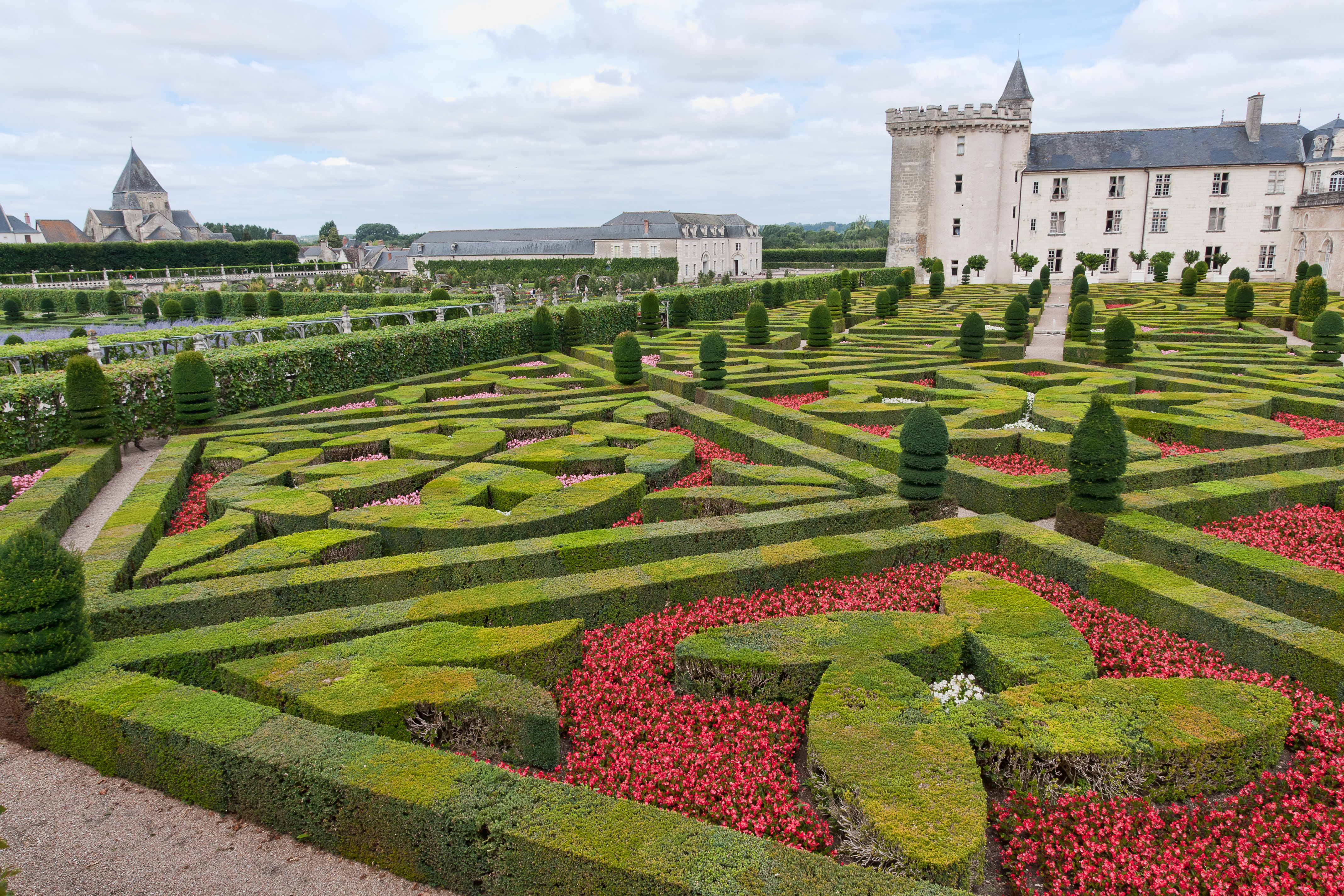 Chateau de Villandry.